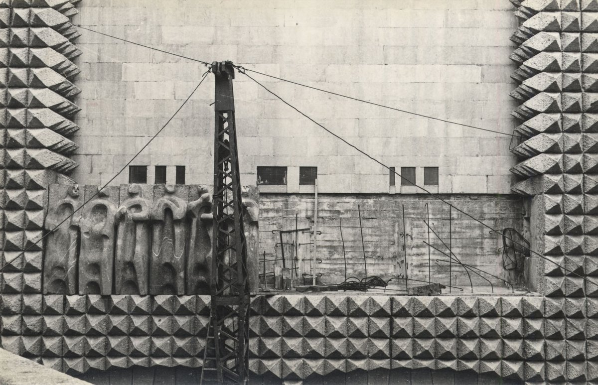 Apostoluen Frisoa - Arantzazu